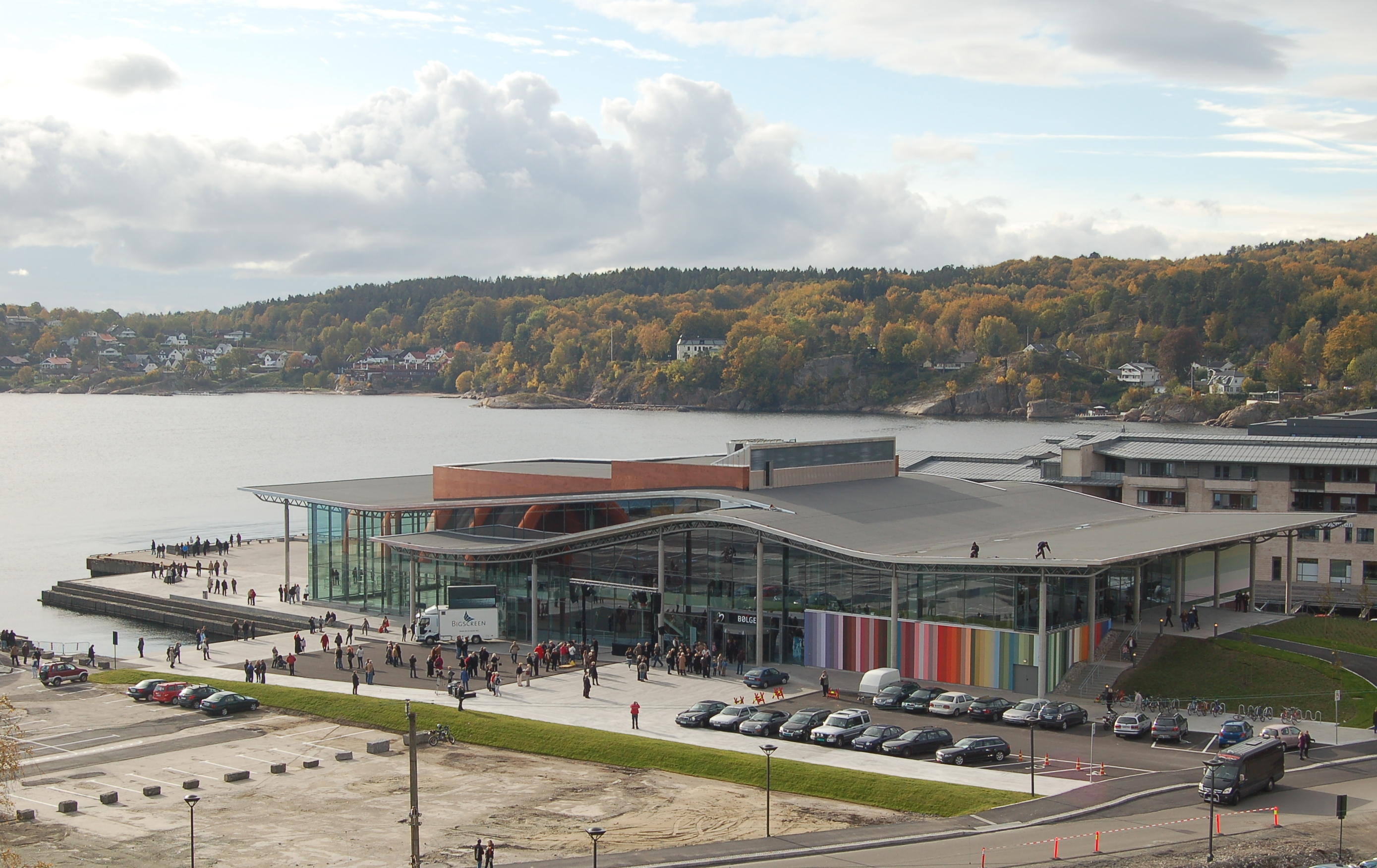 Kulturhuset Bølgen i Larvik ved åpningen 10.10.2009